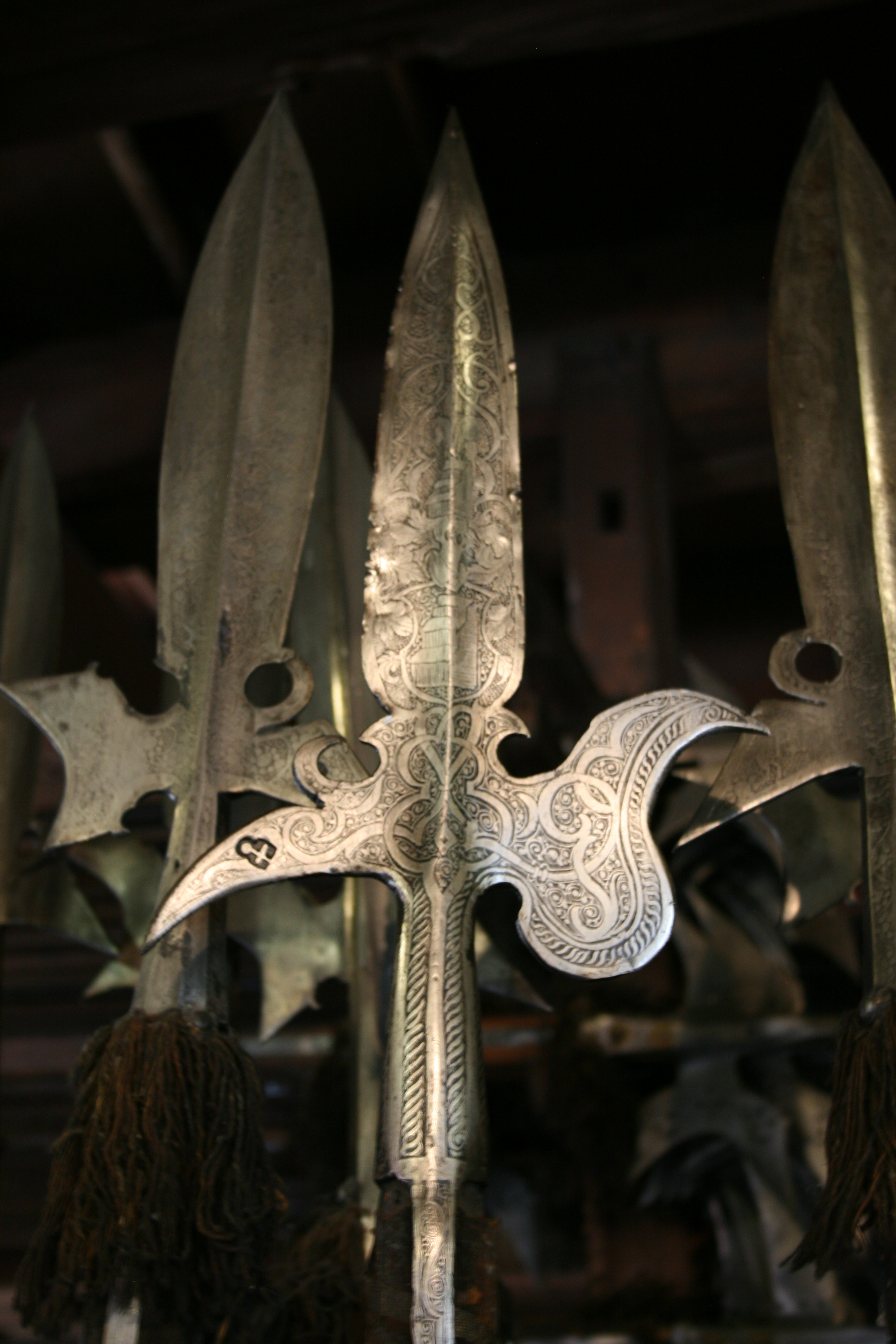 Ätzverzierungen auf Hellebarde im Landeszeughaus in Graz.